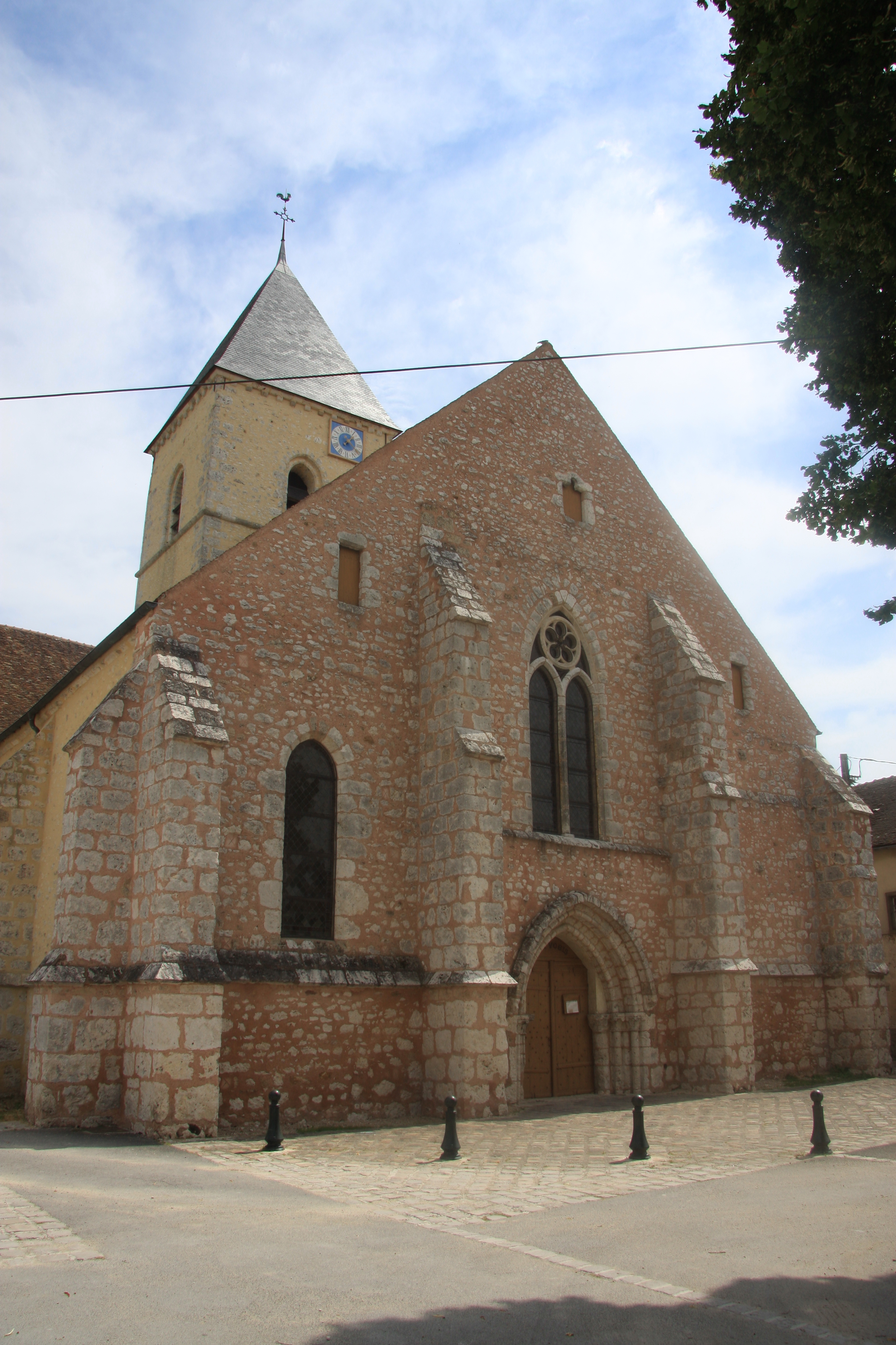 Église Saint-Denis de Beton-Bazoches